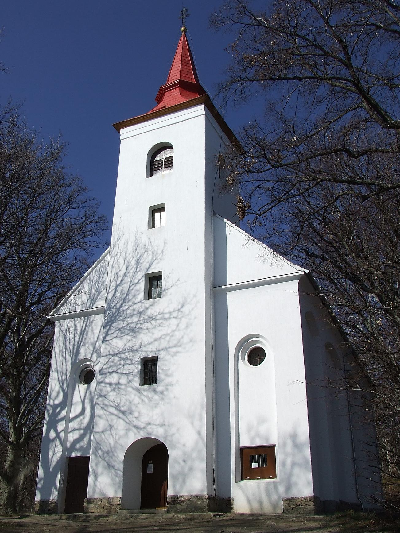 A Szent Vid kápolna Velem község mellett (Vas megye)